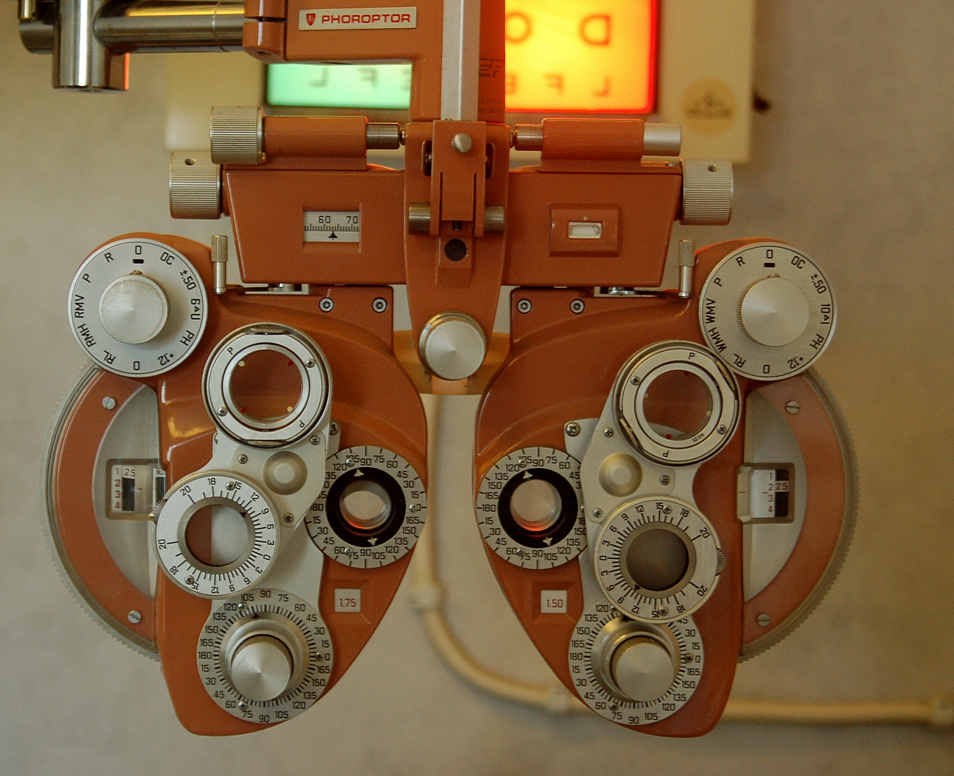 AO Phoropter